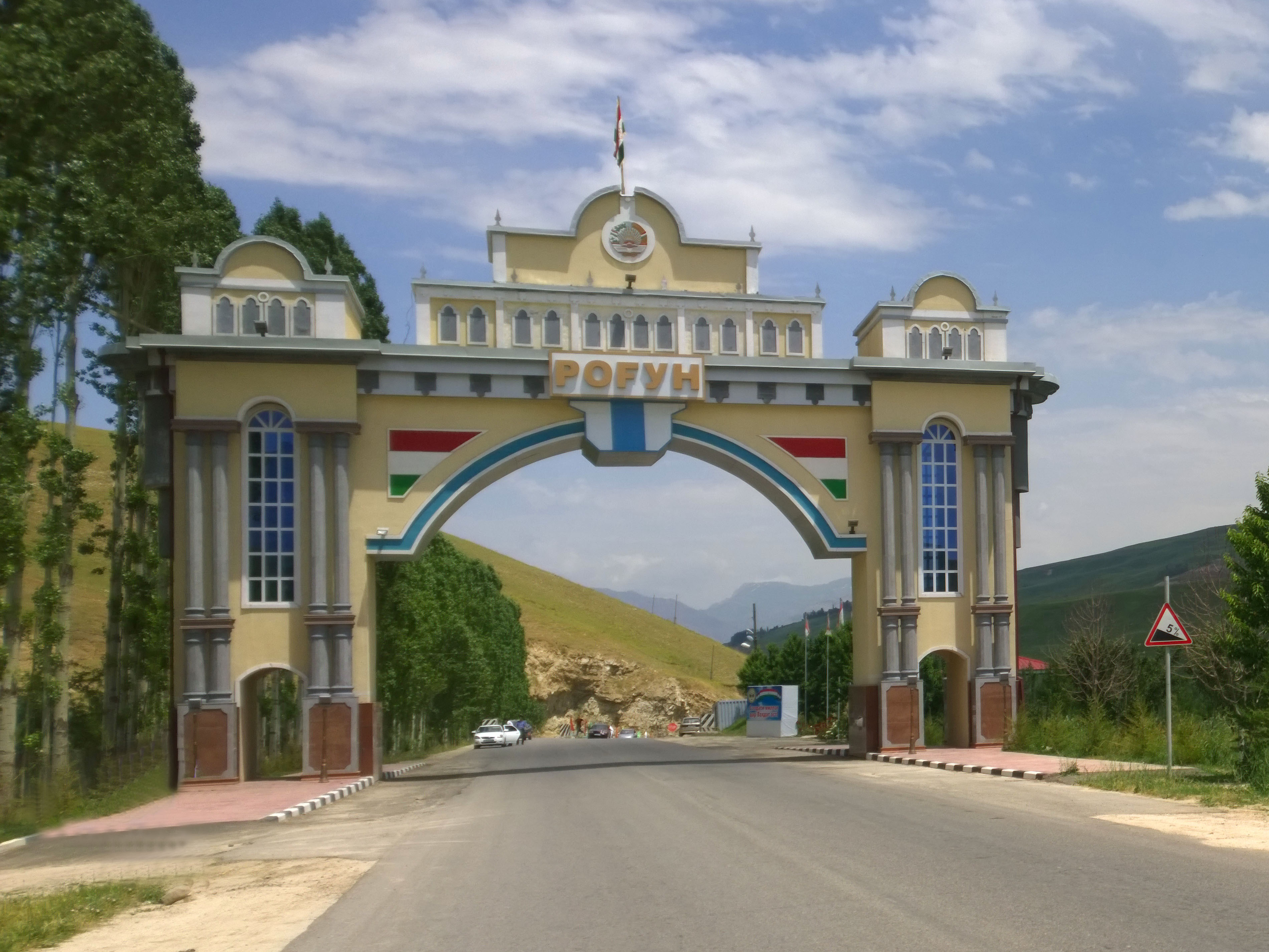 Тоҷикӣ: Дарвозаи шаҳри Роғун